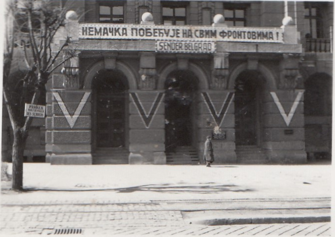 Aufnahme durch meinen Onkel 1942